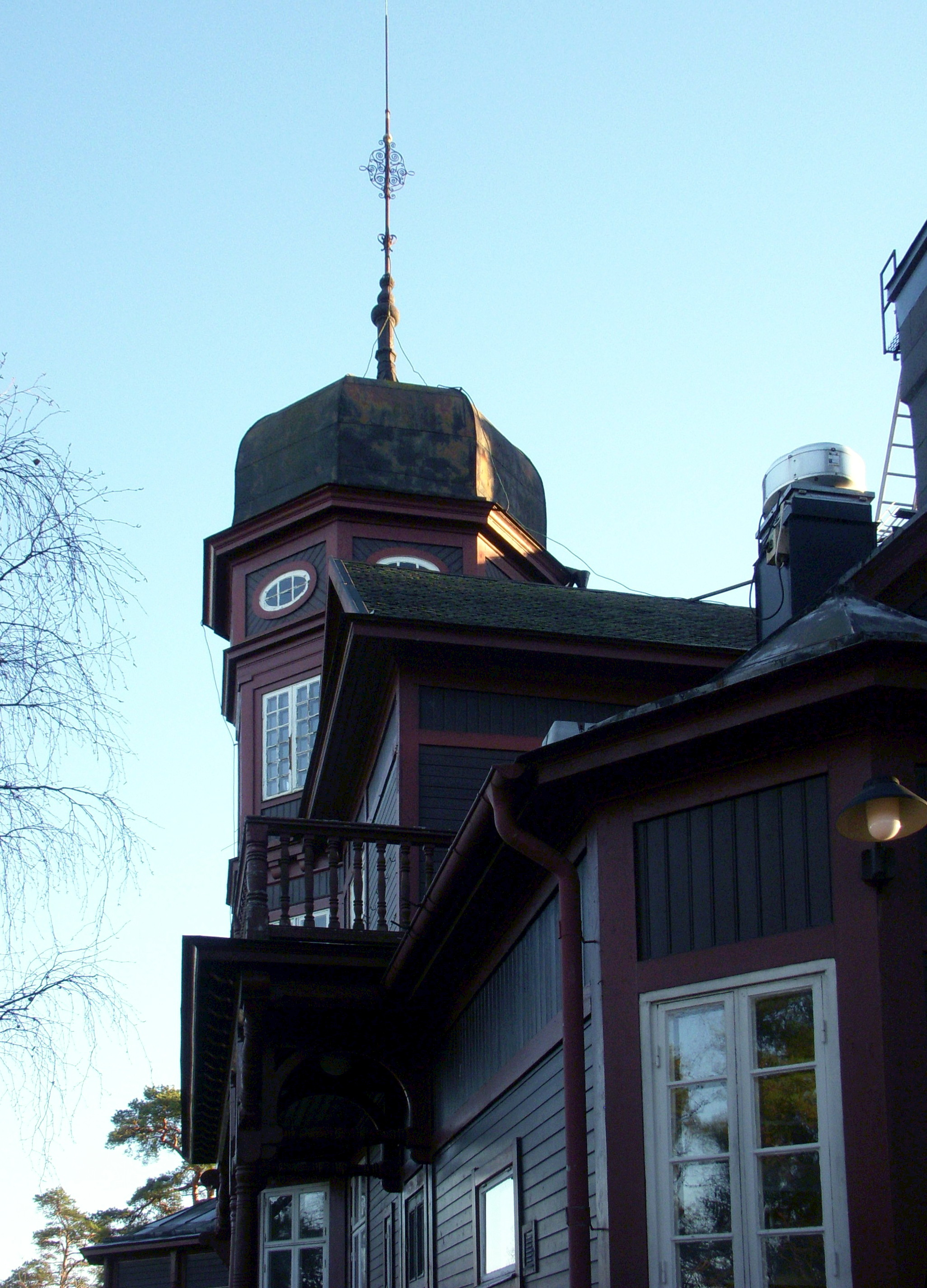 Villa Gadelius, Saltsjöbaden (tidigare Villa Sjötäppan), arkitekt Gustaf Wickman.